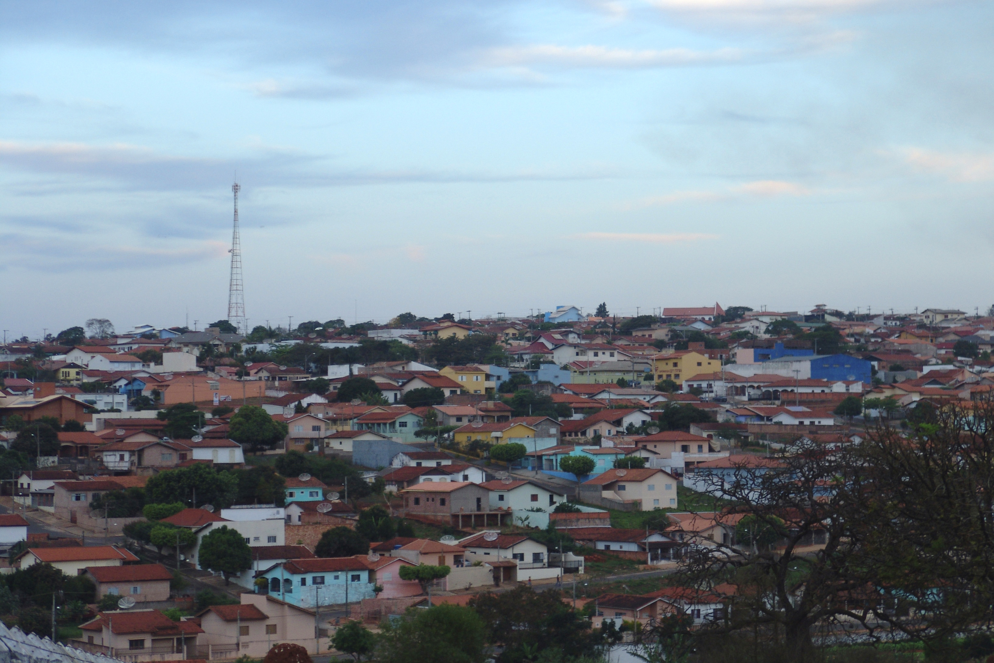 Vista da cidade de Itaí, São Paulo, Brasil